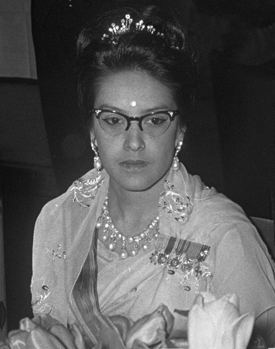 Galadiner in het Rijksmuseum, koningin Ratna van Nepal